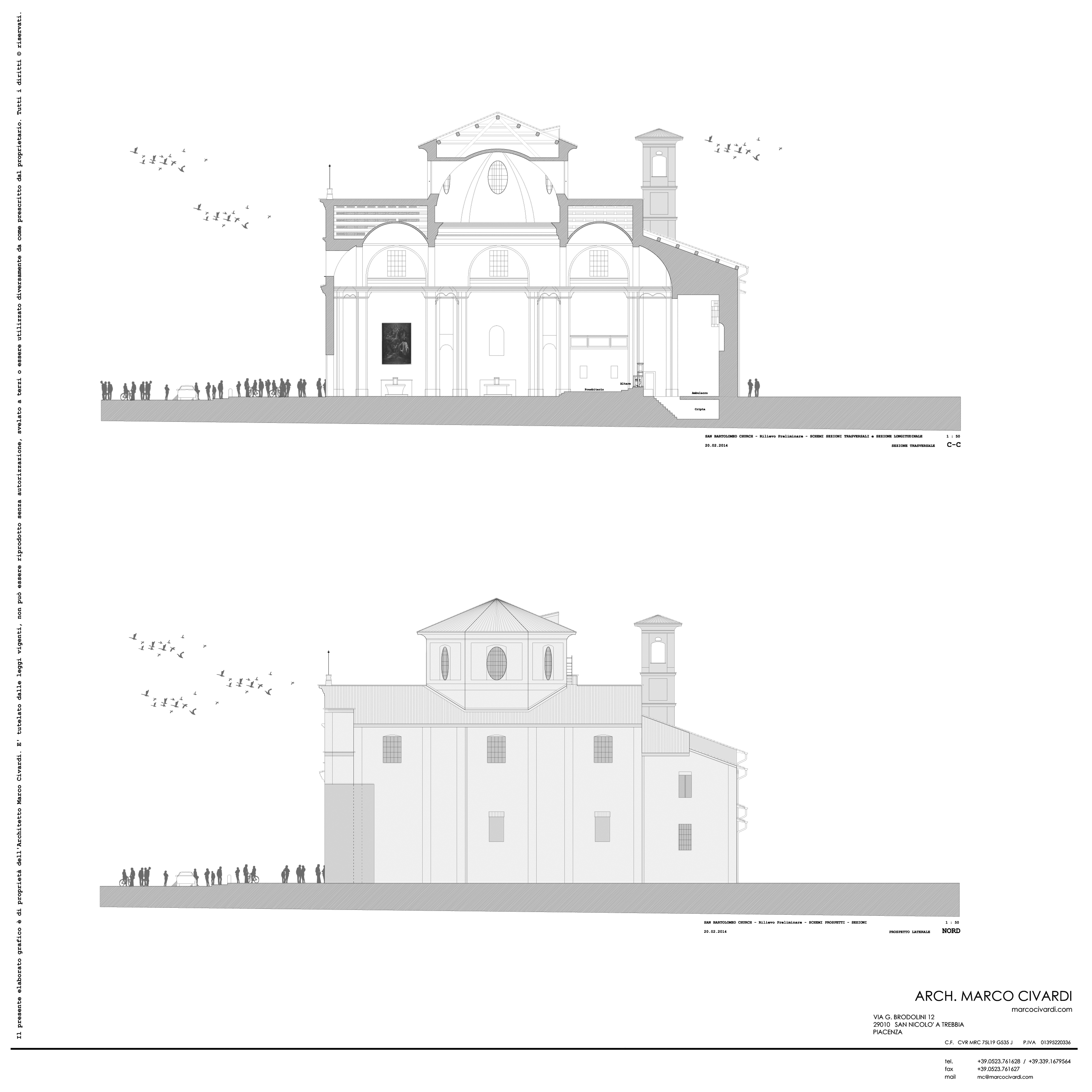 Rilievo della Chiesa di San Bartolomeo (sezione e prospetto), autore Marco Civardi